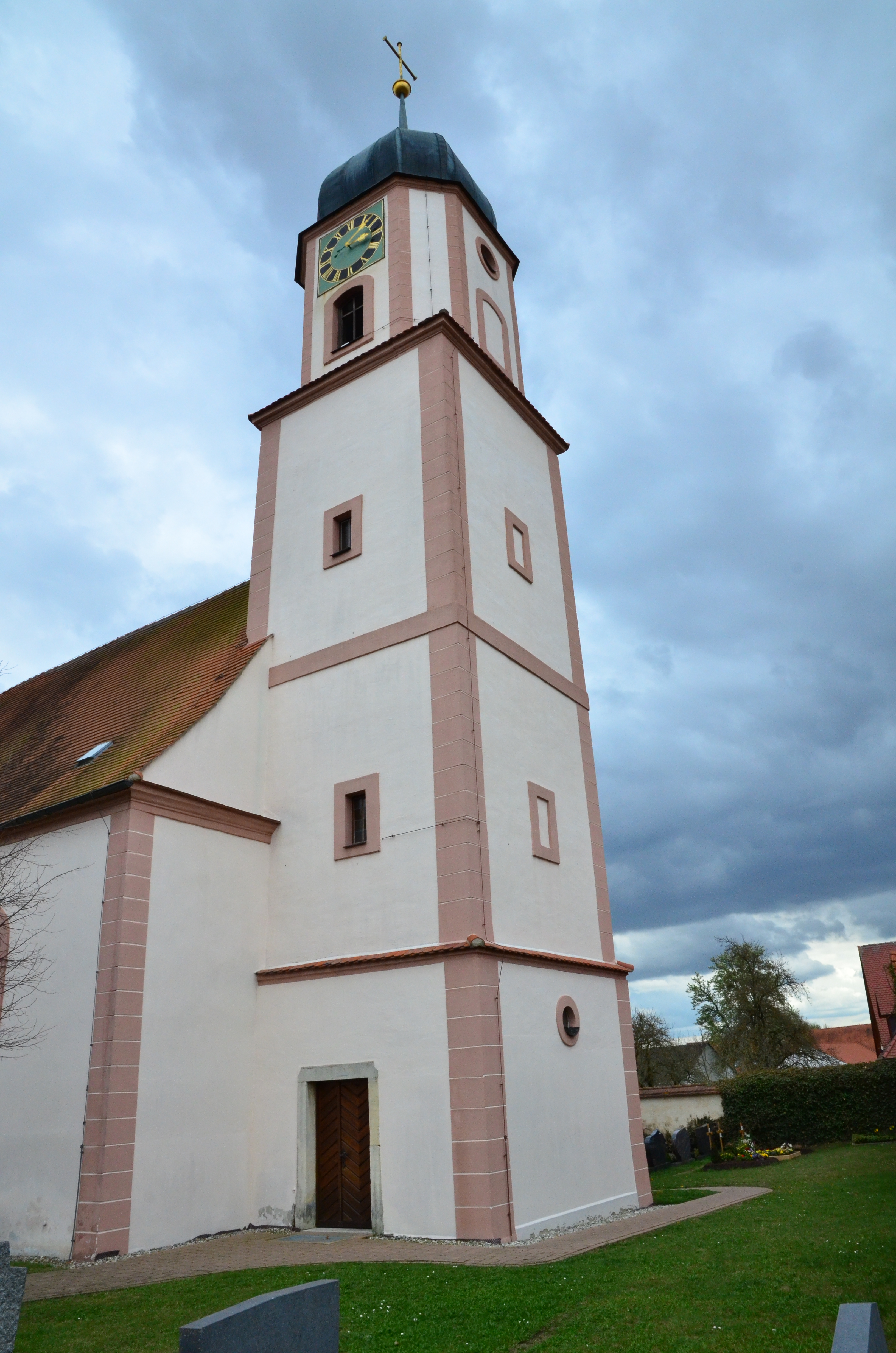 evang.-luth. Kirche St. Moritz in Wechingen